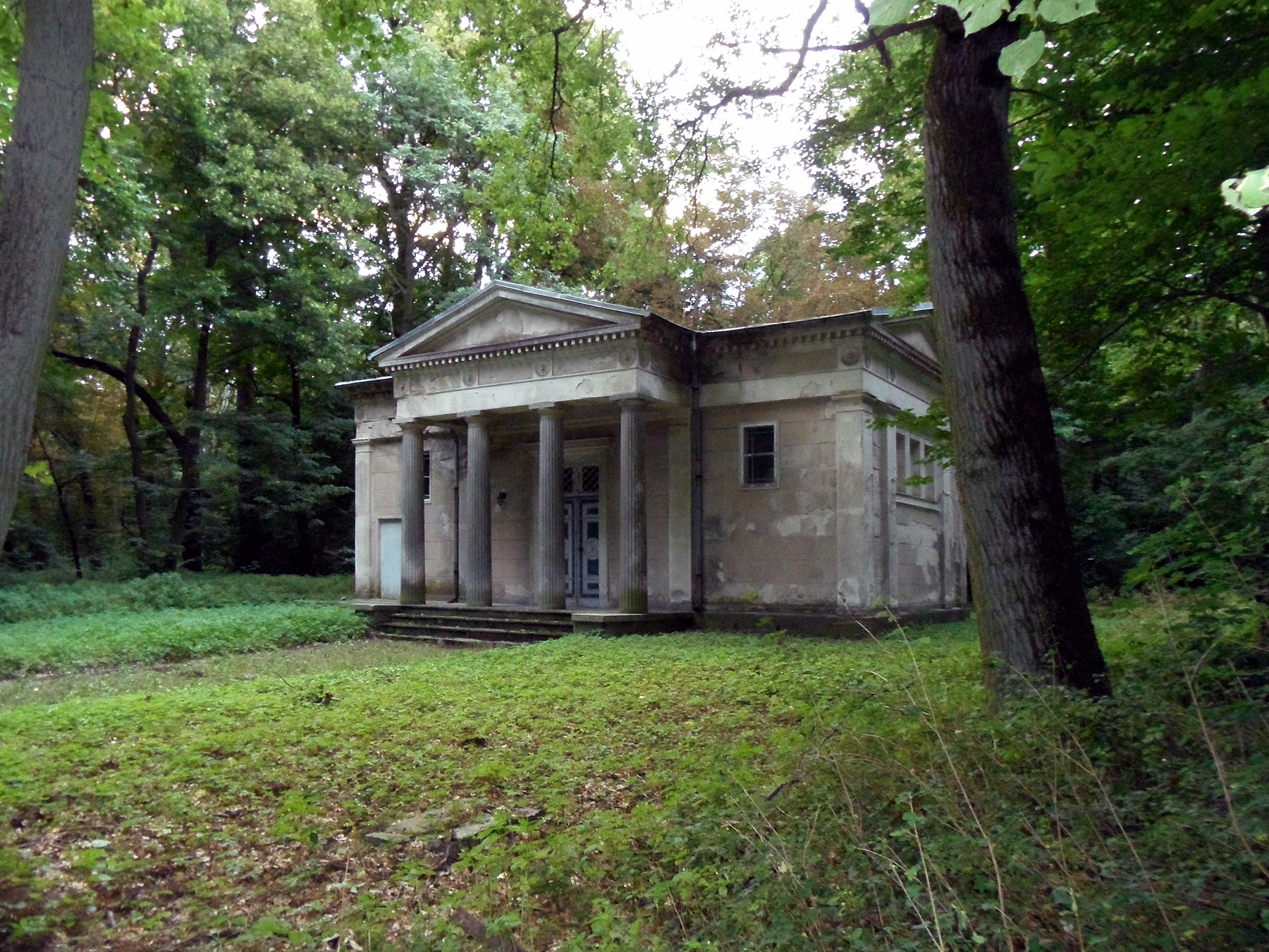 Vormaliges Mausoleum der Fam. von Eickstedt - seit 1897 Dorfkirche Koblentz Datum: 19.08.2011 Urheber: onnola (Flickr-User) Quelle